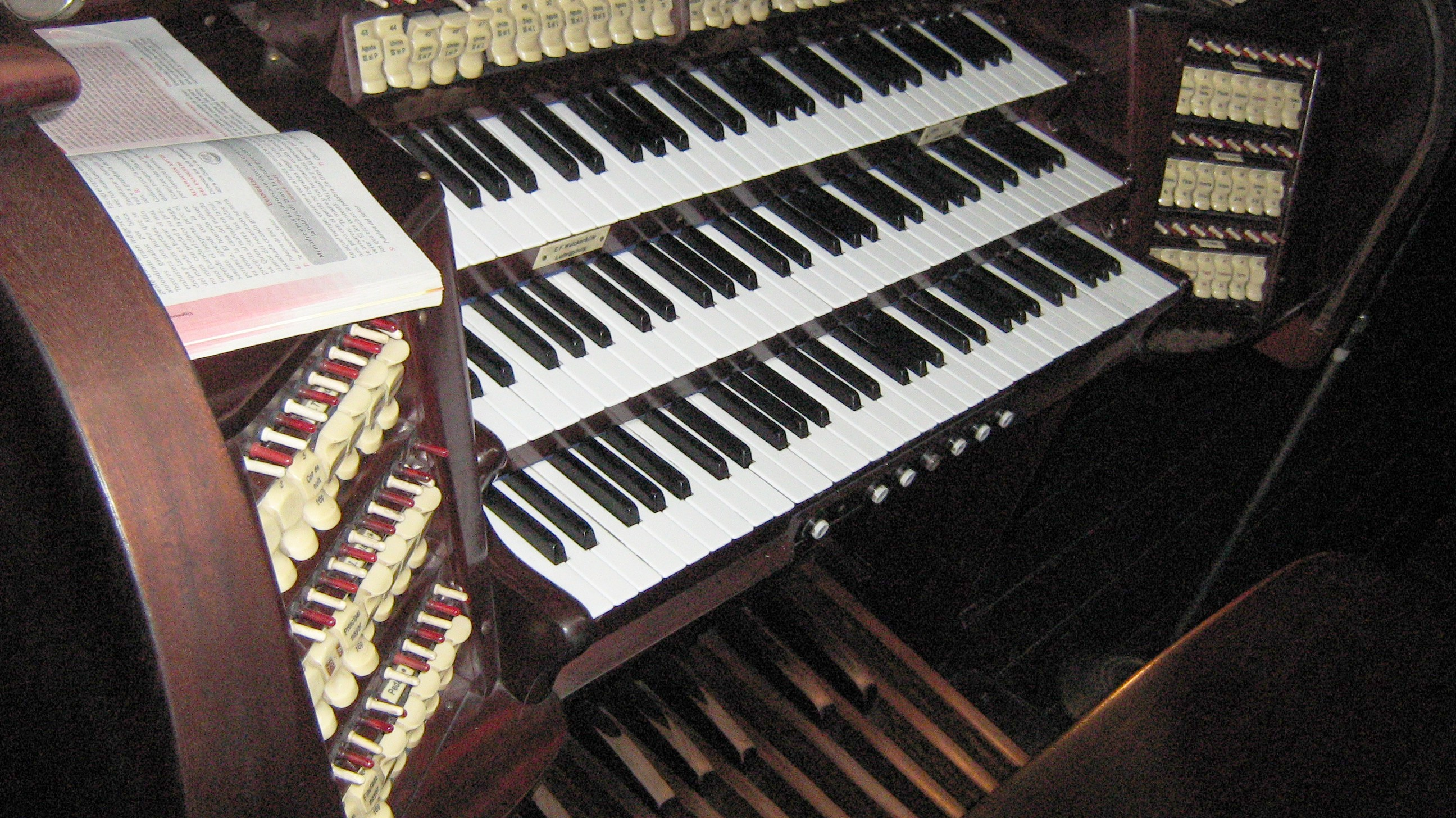 Teclado del Órgano marca E.F. Walcker & Cie. de la Catedral Metropolitana de Medellín. Colombia